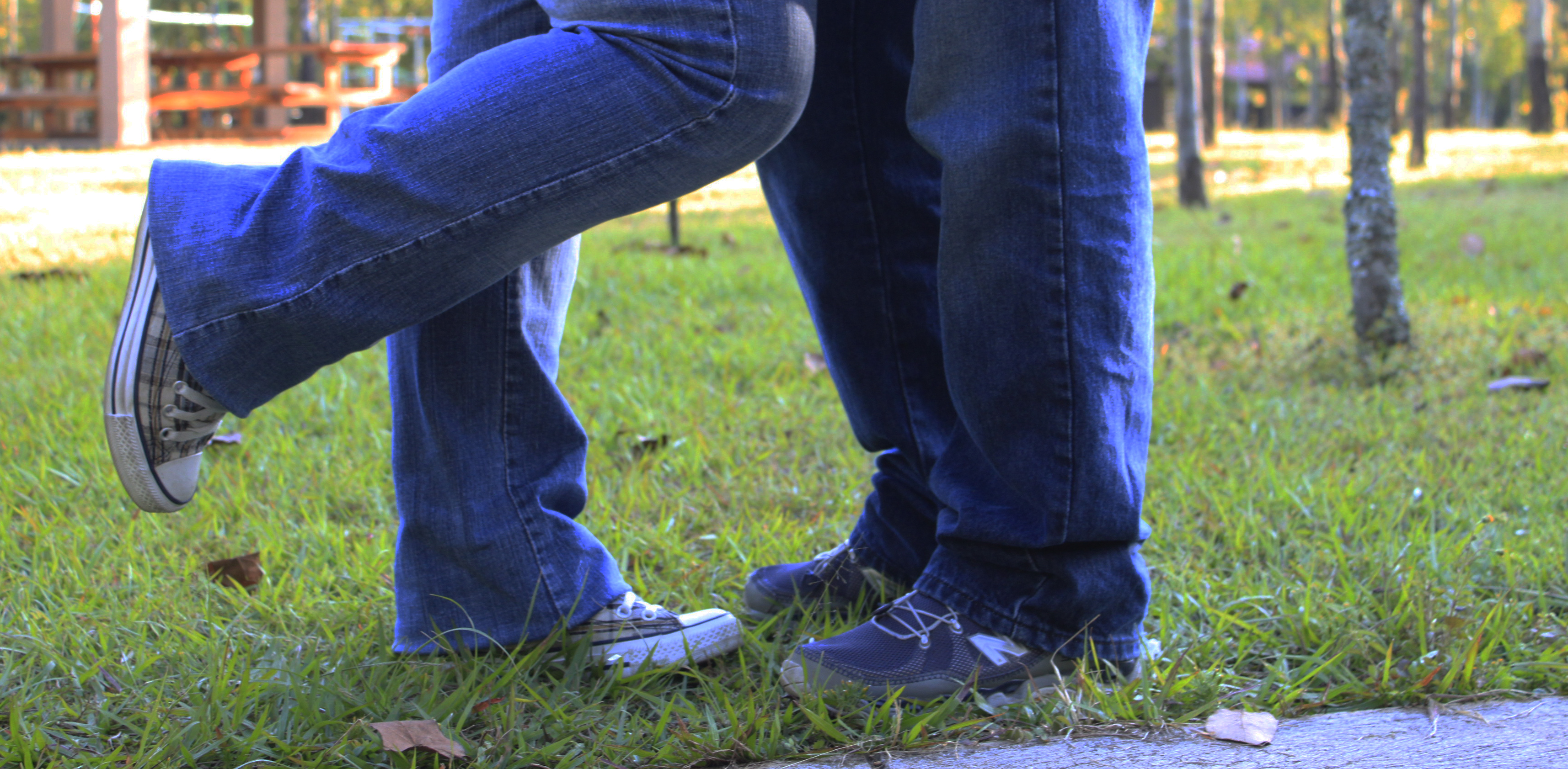 pies beso zapatos pareja